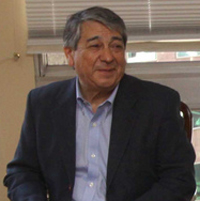 Arturo Martínez, dirigente sindical chileno.